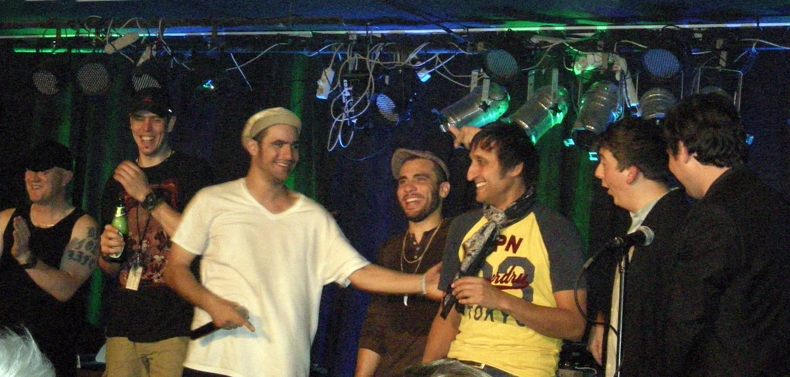 Koncert zespołu Us3, Bydgoszcz "Estrada Stage Bar", 22/10/2011.